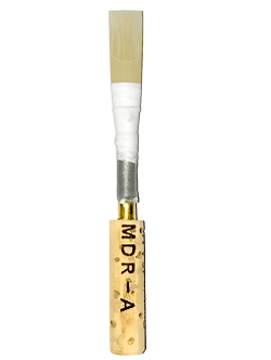 日本で使われている典型的なタイプのオーボエリードの例